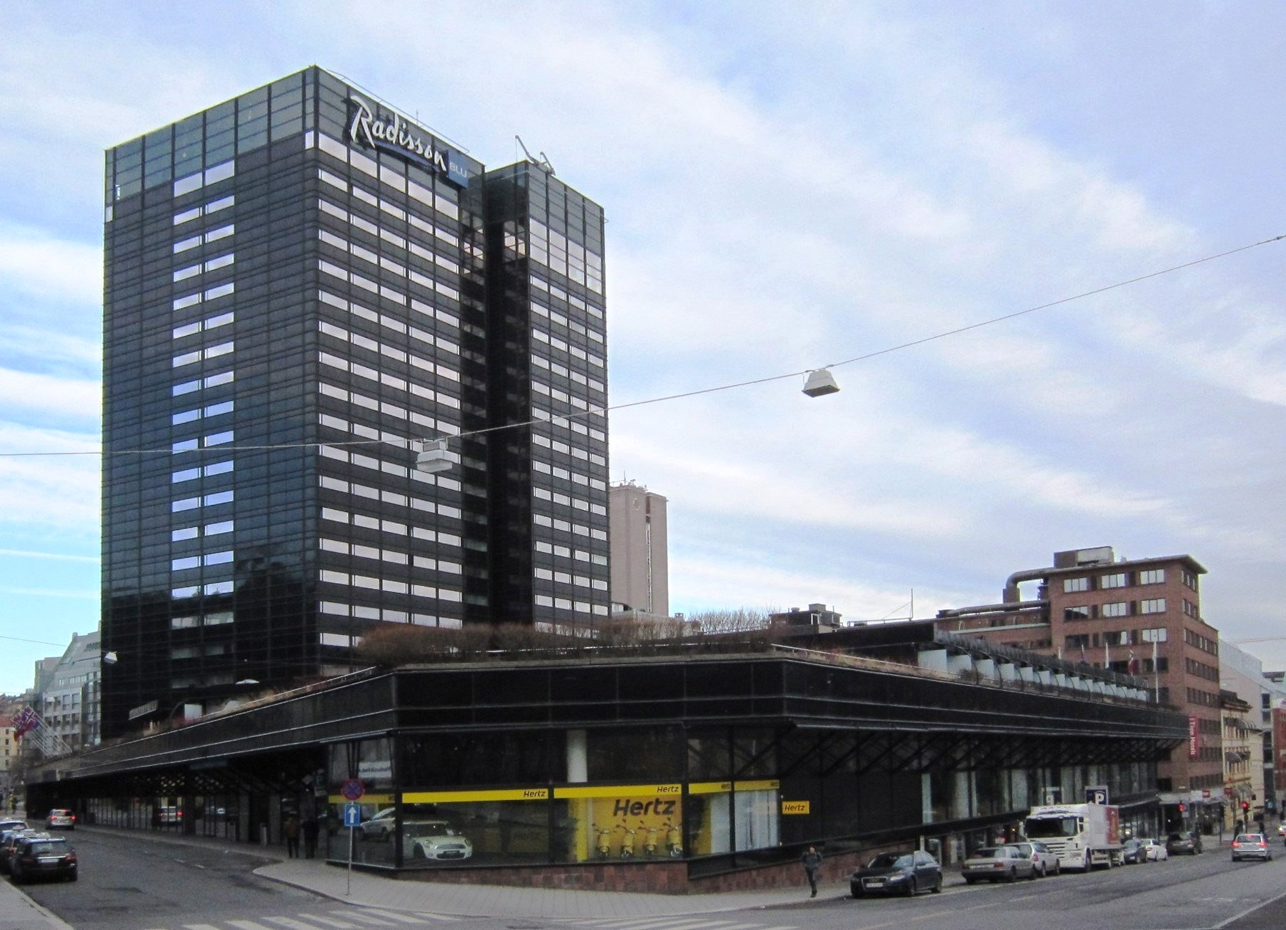 SAS-hotellet i Oslo